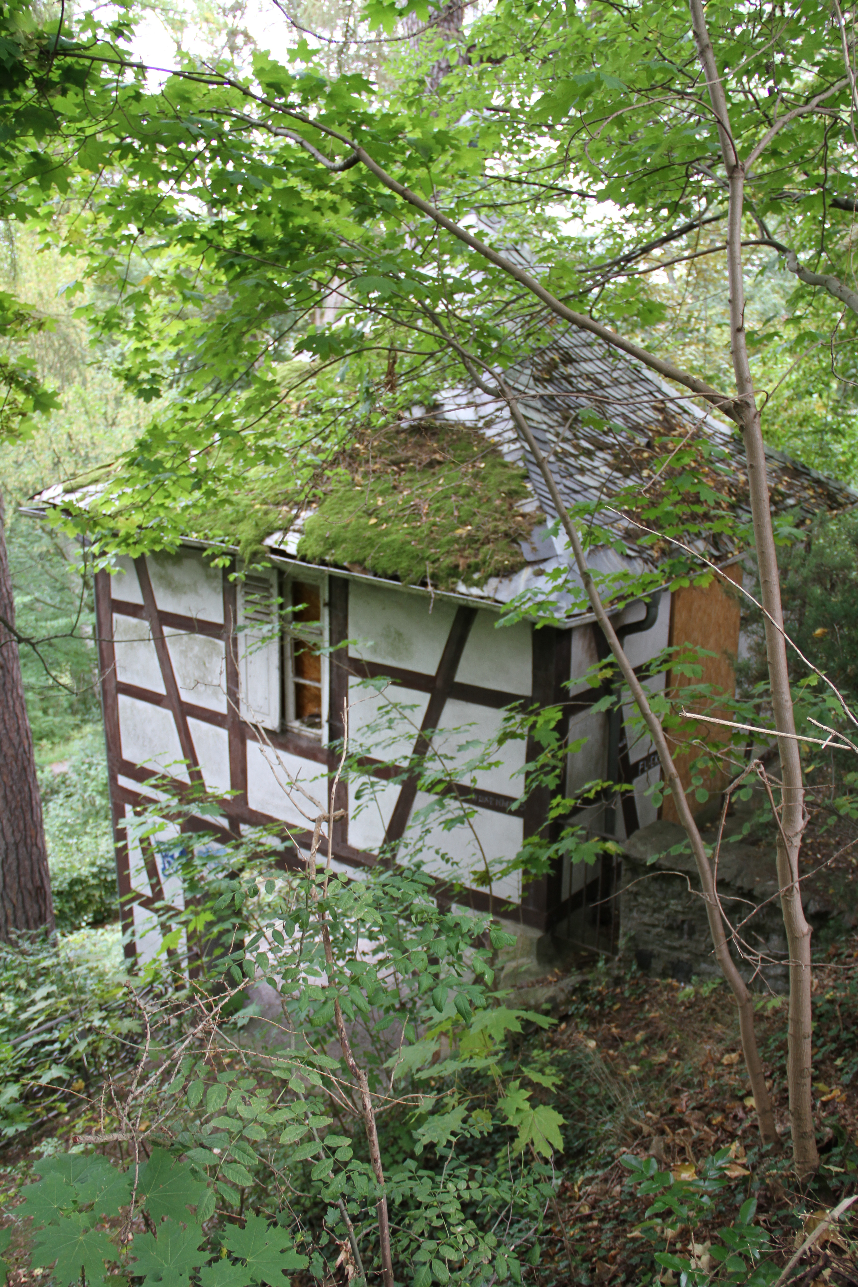 Dieses Foto entstand im Rahmen des Projekts Wiki Loves Monuments Mittelhessen, das aus dem Community-Projektbudget von Wikimedia Deutschland e. V. gefördert wurde.